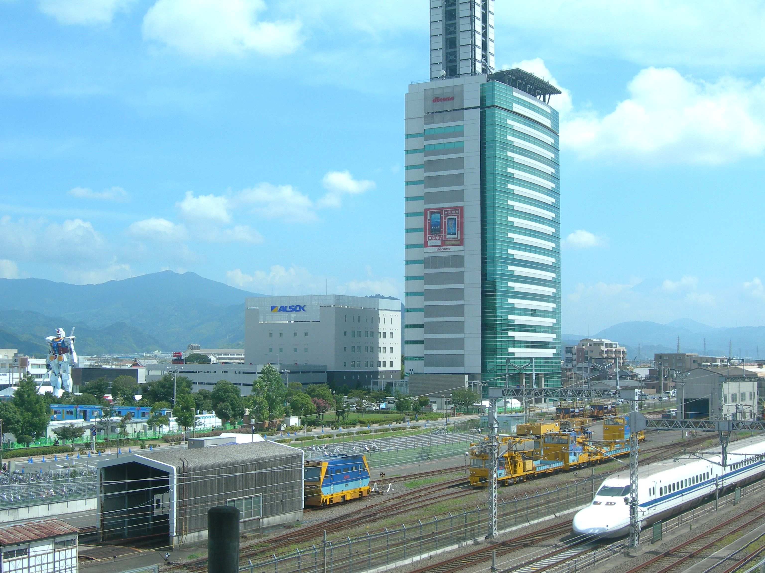 東静岡駅周辺の風景(NTTドコモ東海静岡ビル・東海道新幹線700系)静岡ホビーフェアを当日実施中で、等身大の ガンダムやドコモ静岡ビルの壁にはXPERIAのプラモデル写真などが見える